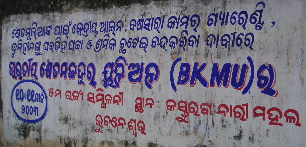 Bharatiya Khet Mazdoor Union mural in Bhubaneswar, India.